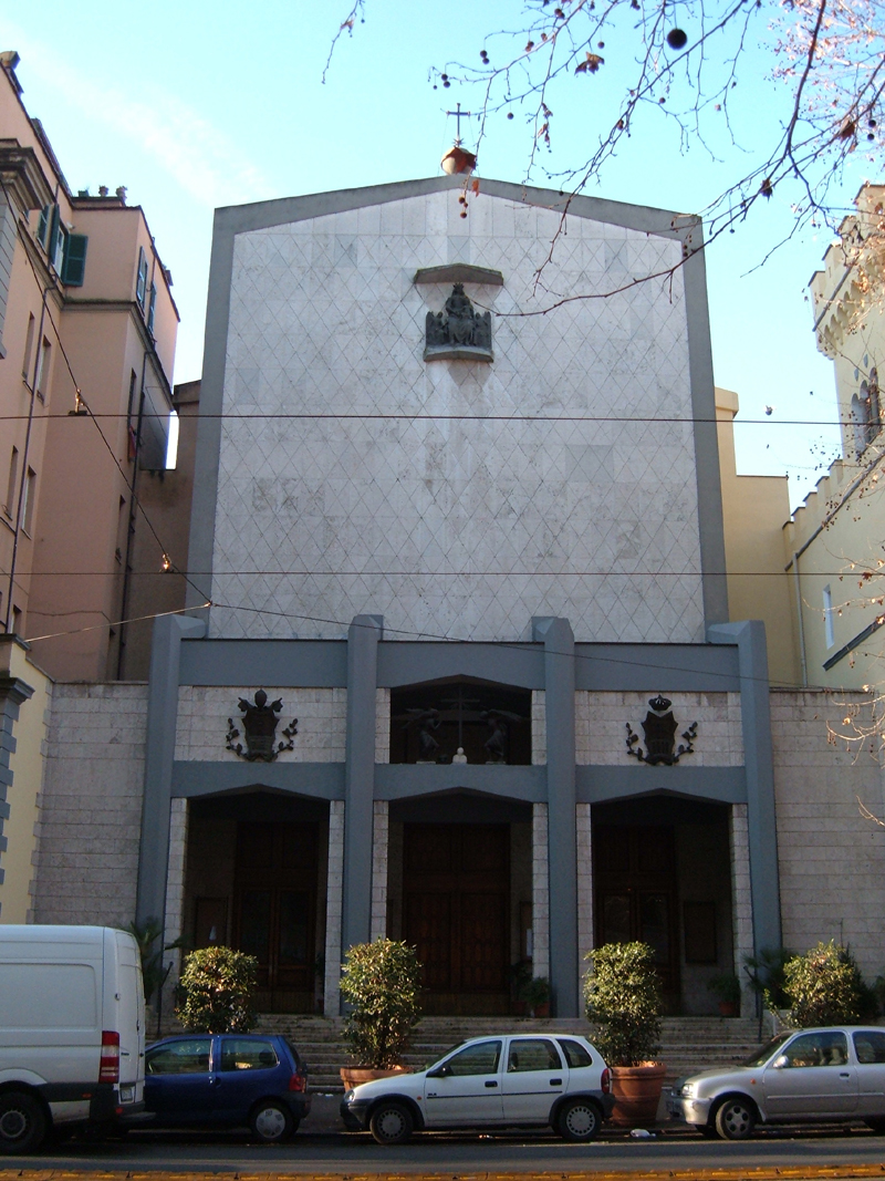 Chiesa di Santa Maria della Mercede e Sant'Adriano, a Roma, nel quartiere Salario.